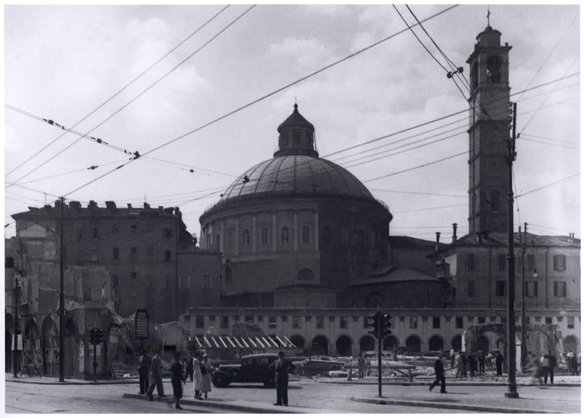 Milano, le demolizione dell'isolato fra corso Vittorio Emanuele e corso Matteotti.